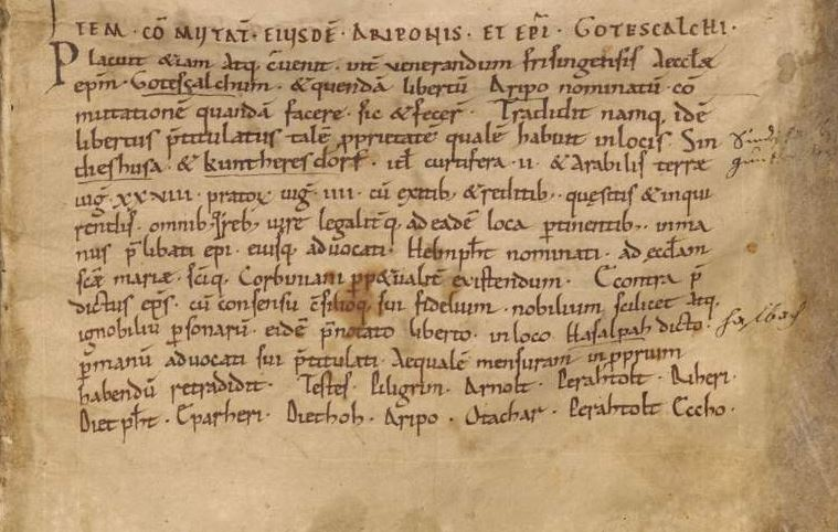 Die erste schriftliche Erwähnung Eichenhausens und Altkirchens 994 - 1004.